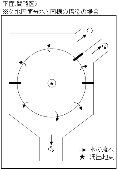 zylindrisches Wasserverteilbecken (Entō Bunsui), Japan